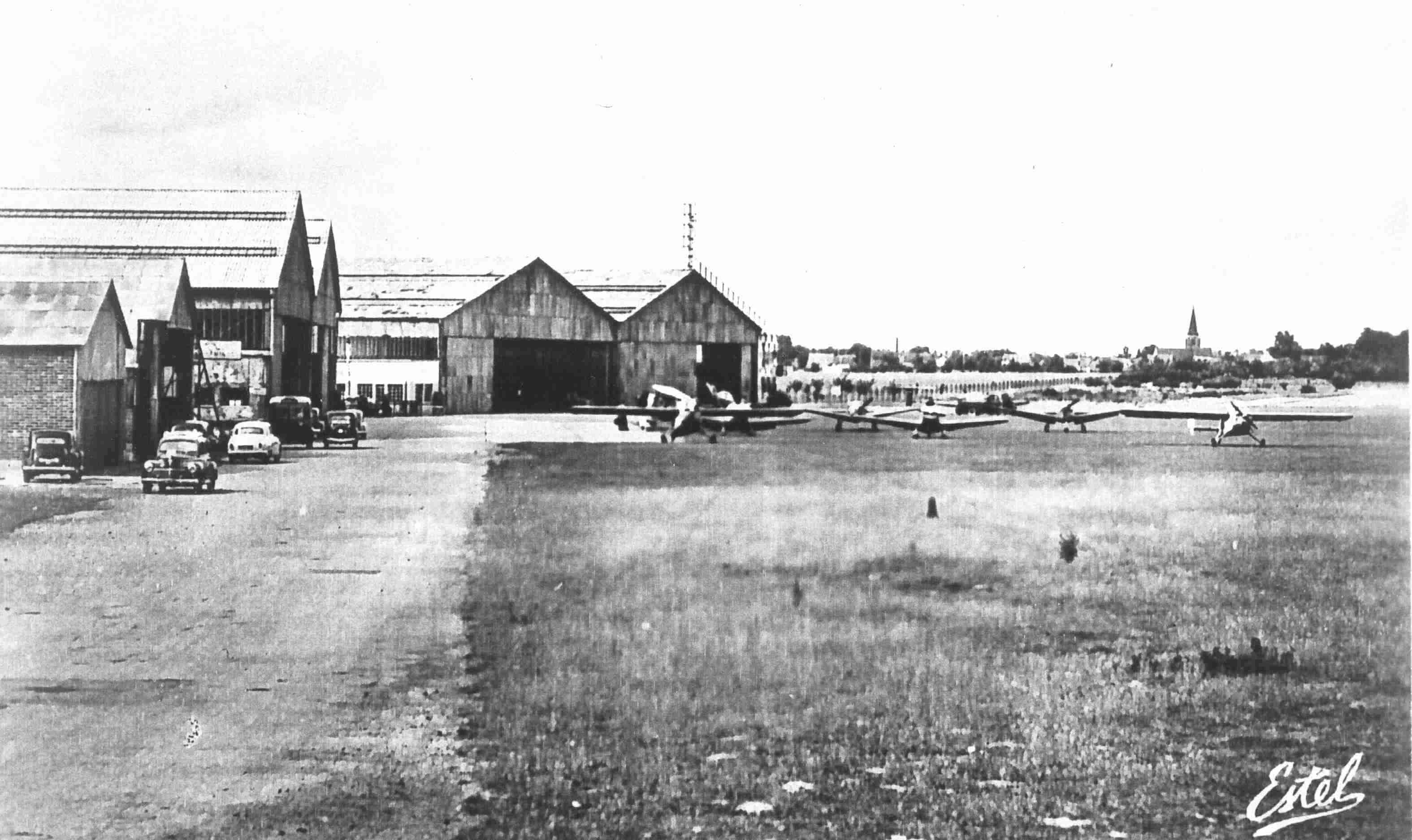 Aerodrome de Guyancourt Carte Postale de ma collection